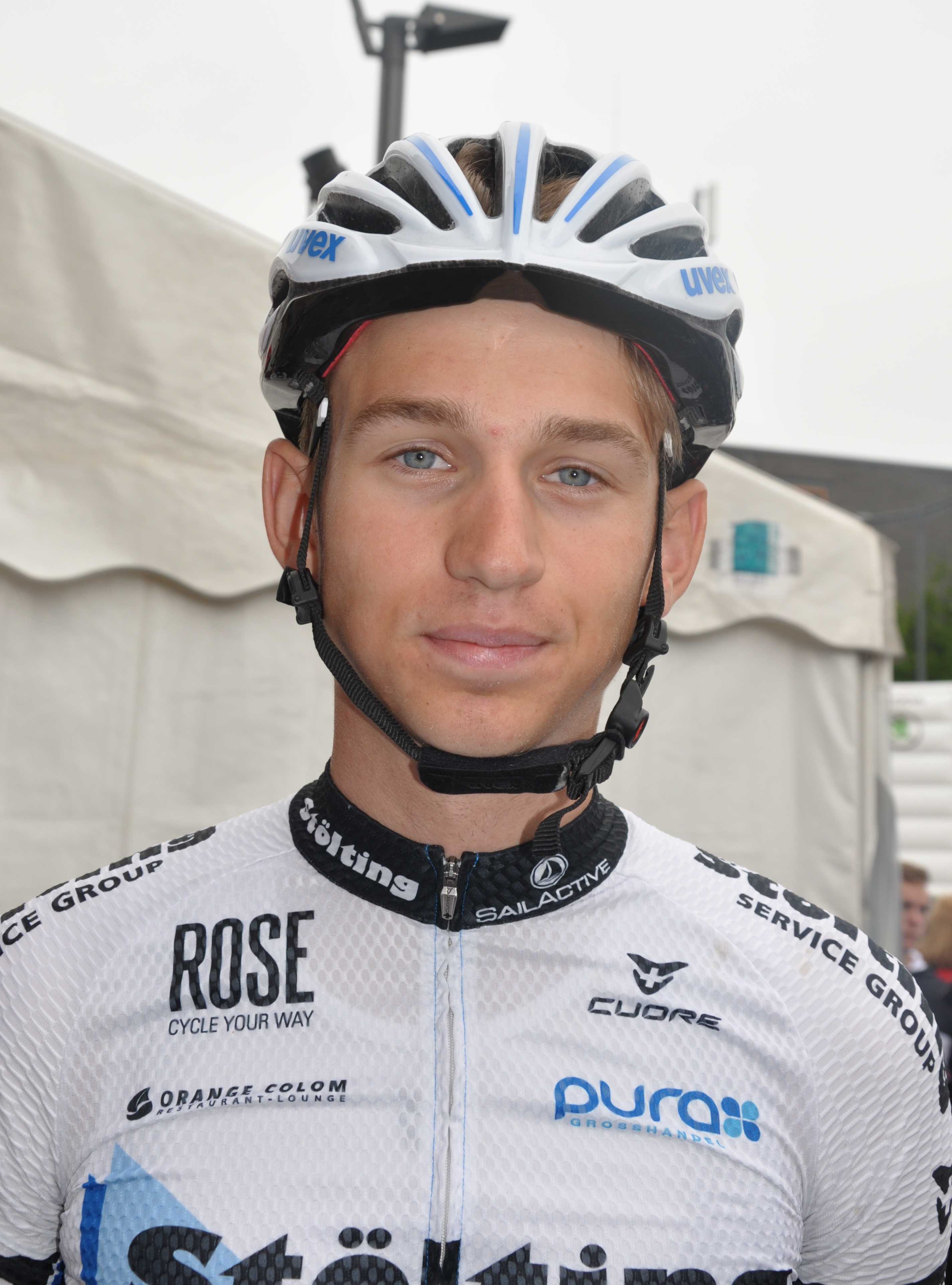 Lennard Kämna, deutscher Radrennfahrer